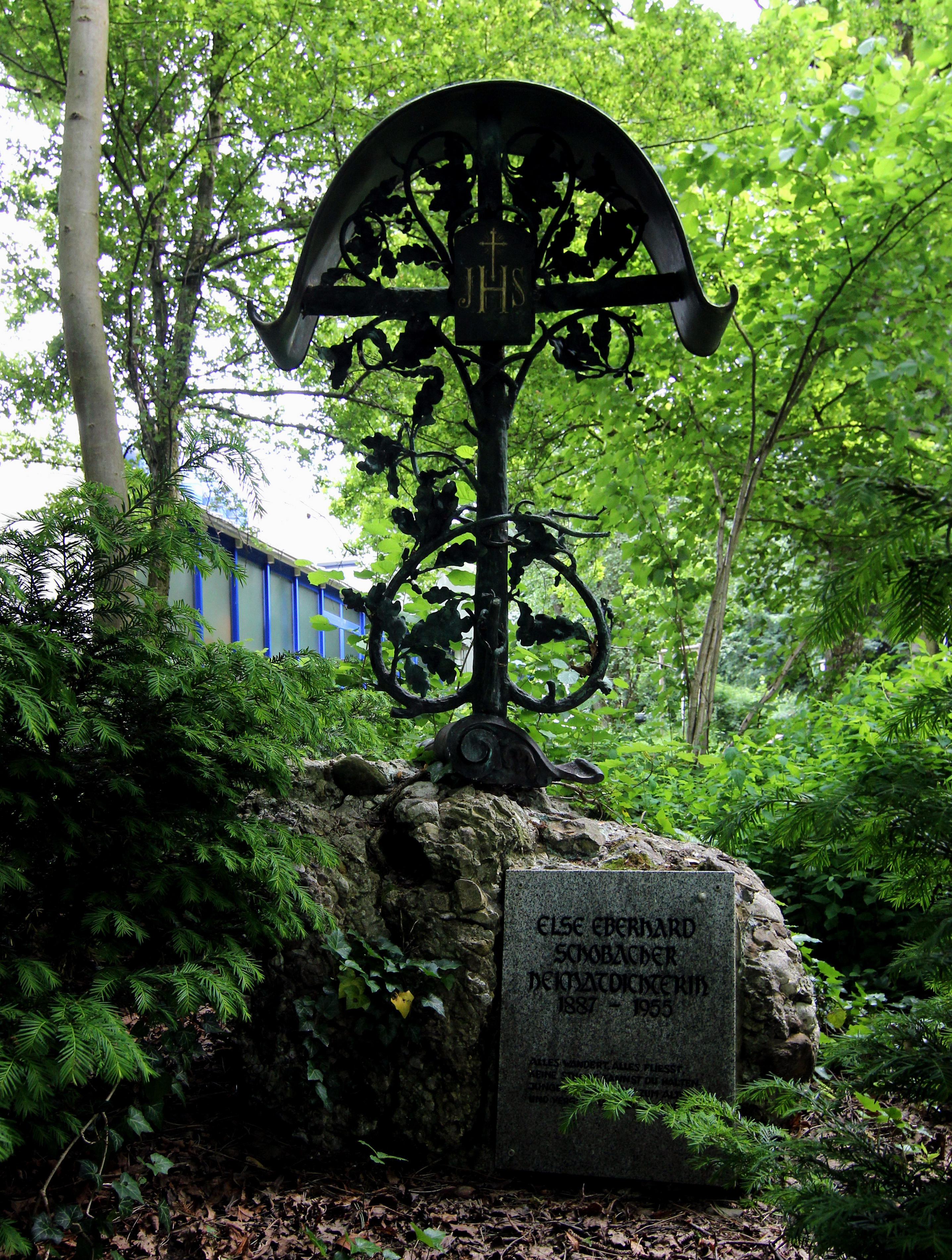 Denkmal an die Autorin Else Eberhard-Schobacher am Allgäu-Gymnasium Kempten